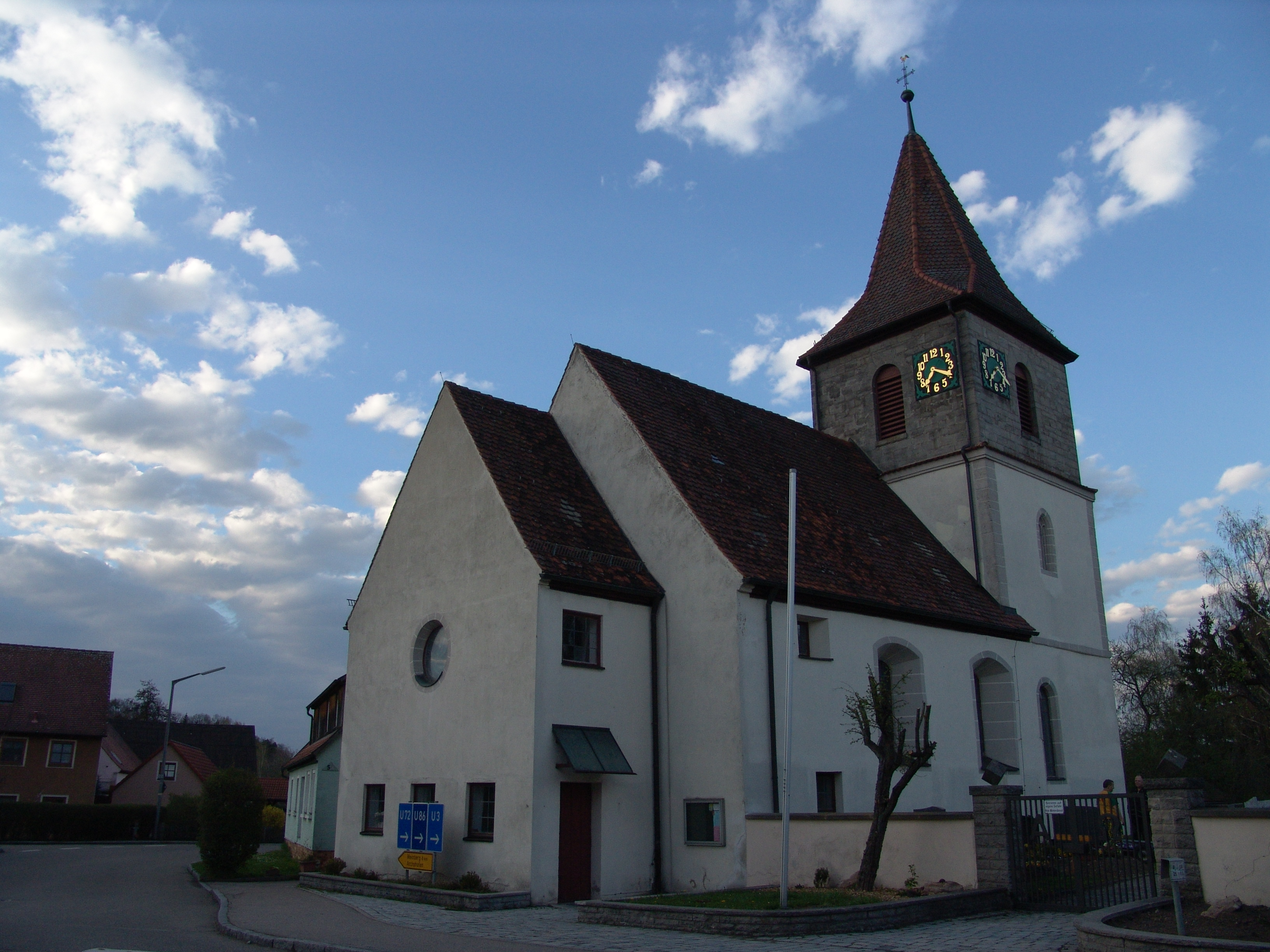 evang.-luth. Kirche St. Maria in Dorfgütingen